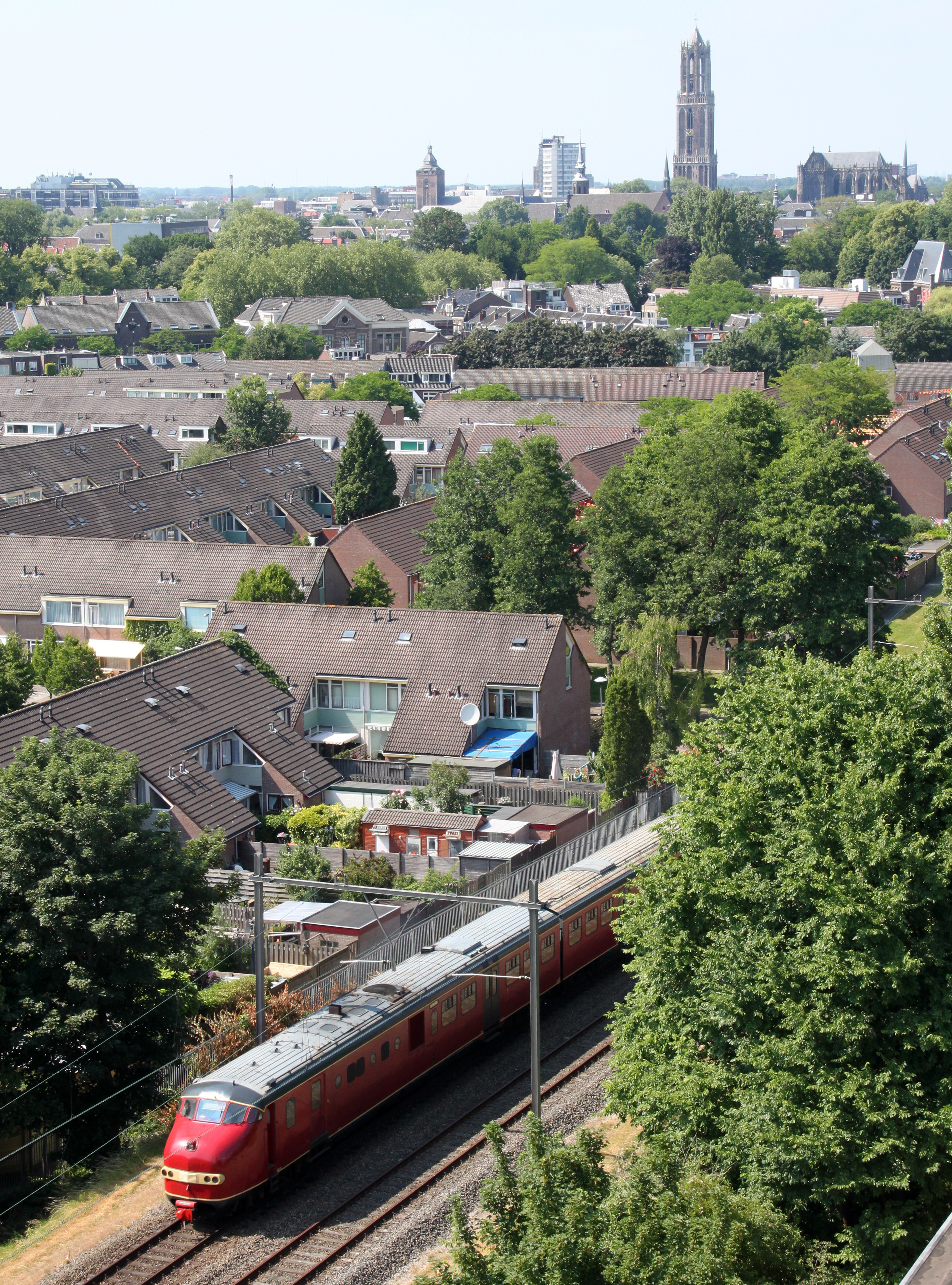 Plan U 114 rijdt in juni 2010 de Heimwee Express van het Spoorwegmuseum. Op de foto rijdt de trein over de Oosterspoorbaan in de wijk Sterrenwijk, Utrecht om in Driebergen-Zeist of Maarsbergen kop te maken.